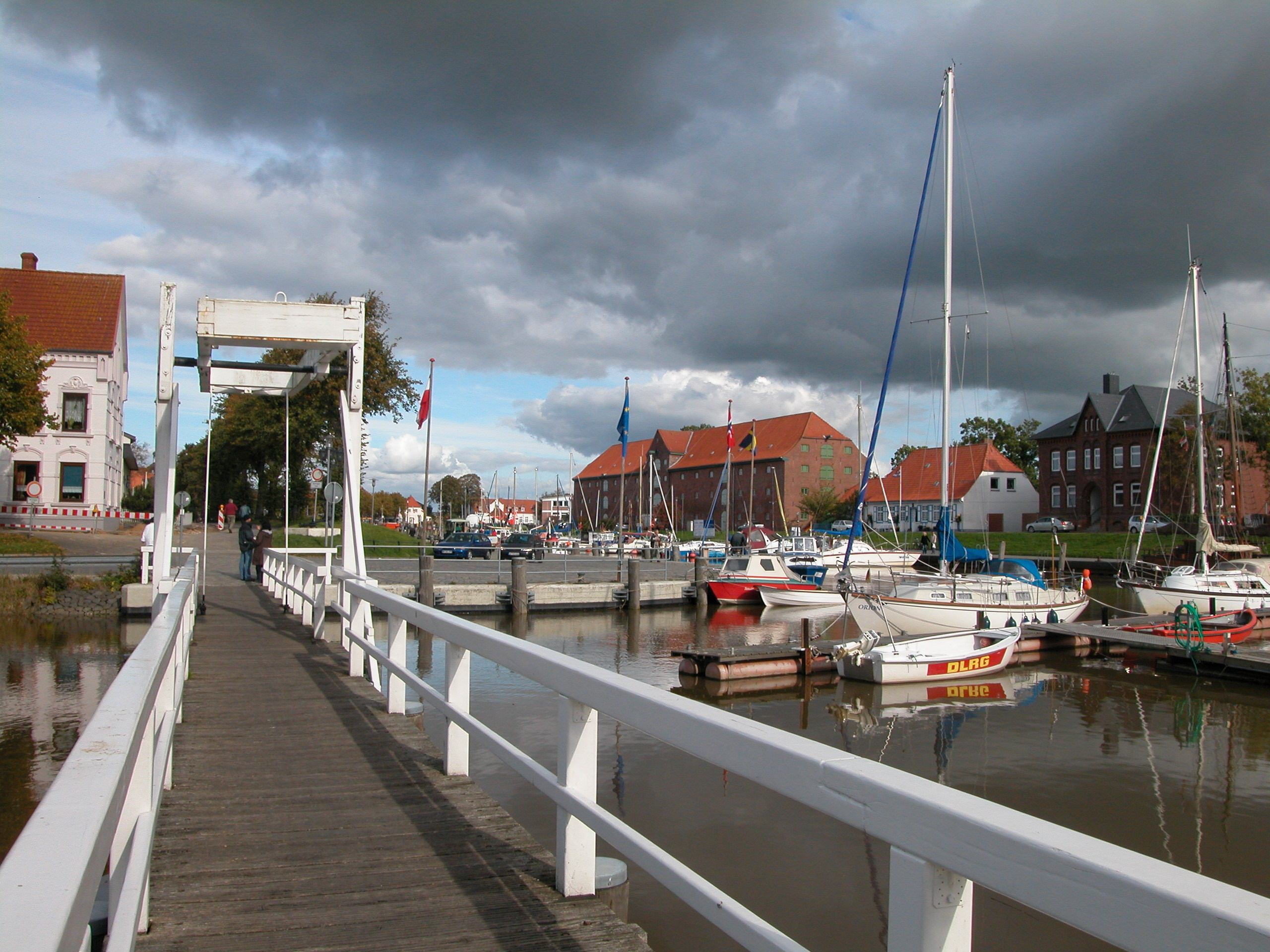 Tönning, Innenhafen Standort:54°18′52.1″N 8°56′38.0″E / 54.314472°N 8.94389°E